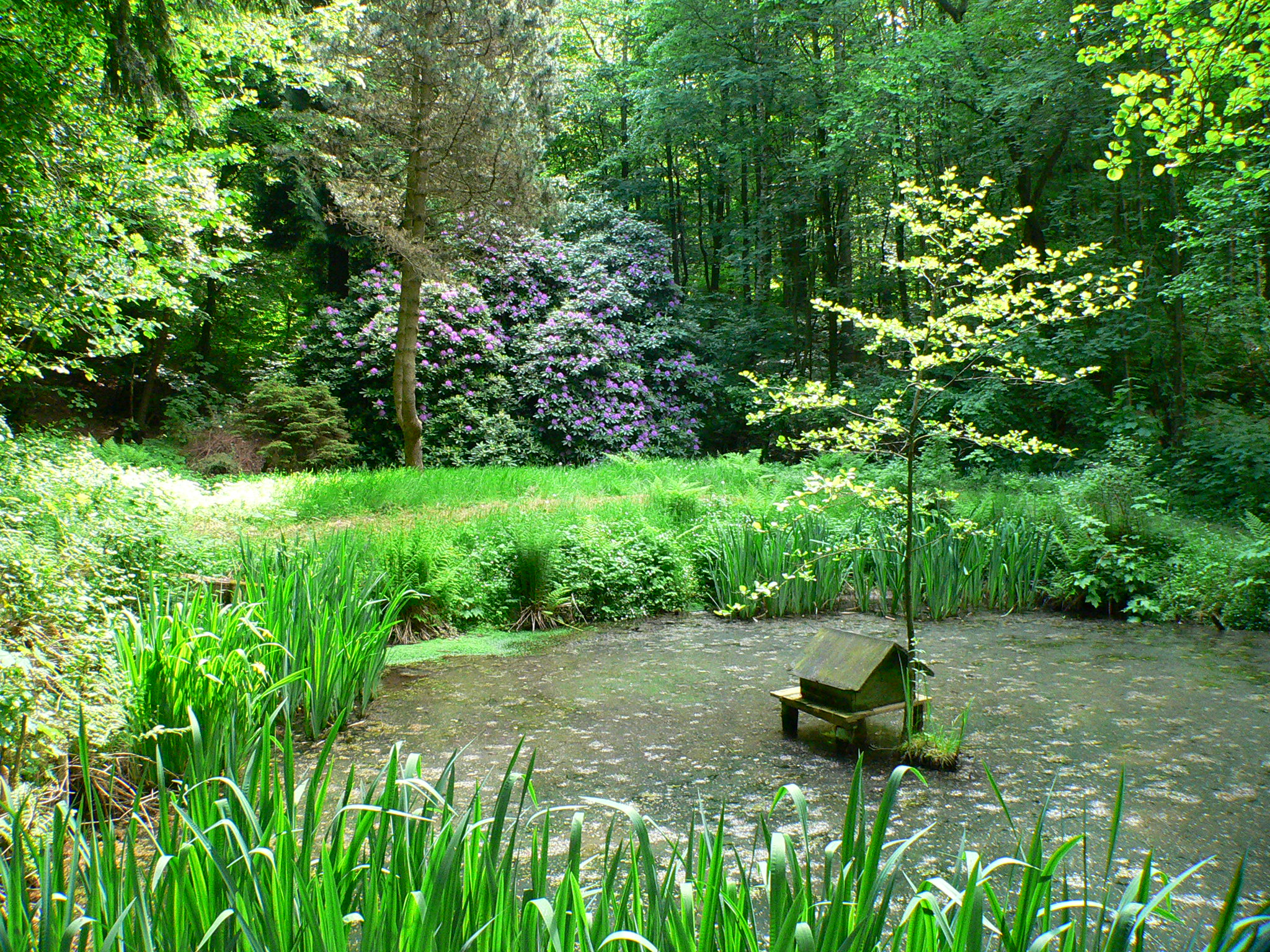 Teichanlage an der Rohrmühle im Bramwald bei Hemeln an der Oberweser, Deutschland